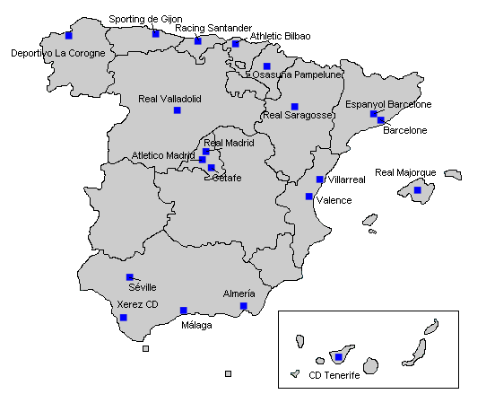 carte des clubs participant au championnat d'Espagne